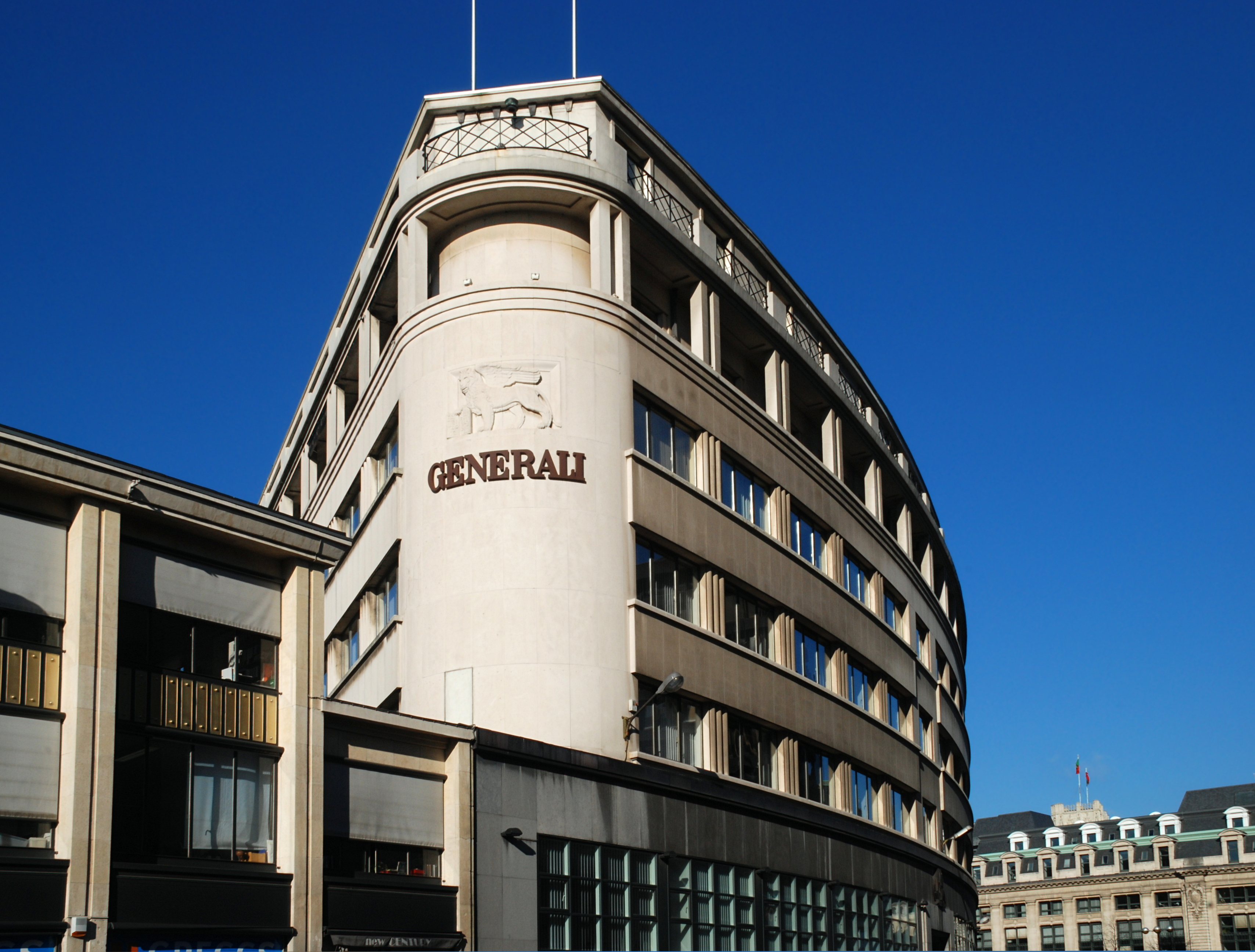 Belgique - Bruxelles - Siège des Assurances Générales de Trieste (Generali), rue Ravenstein 26-46 - architectes Alexis Dumont et Marcel Van Goethem (1936)